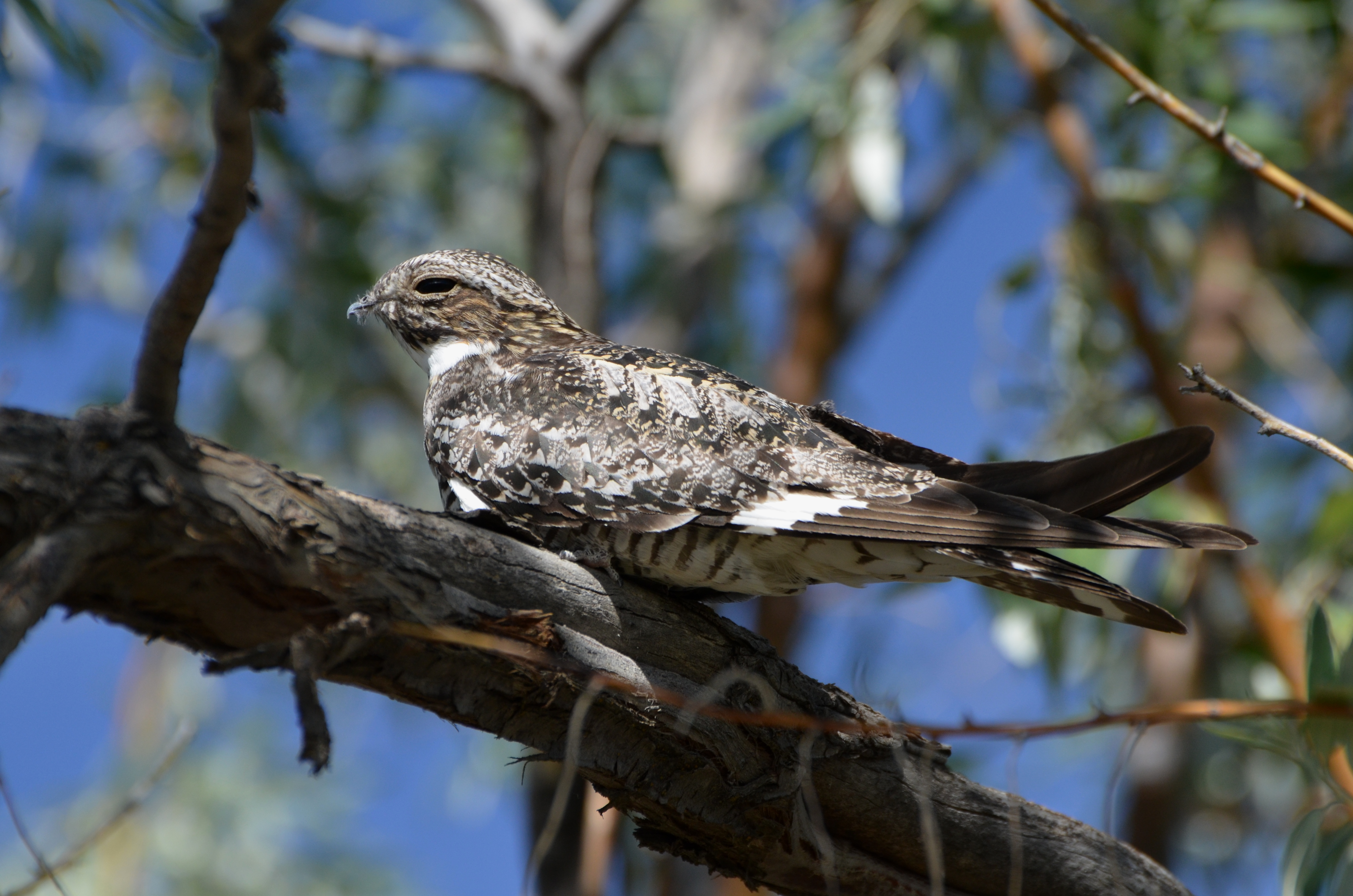 Oregon Trip 2014